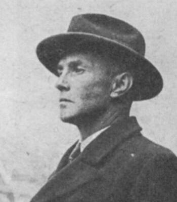 Štefan Tiso (Tisza István, Nagybiccse, 1897. október 18. - Mírov, 1959. március 28.), szlovák ügyvéd, fasiszta politikus. Az 1938–1945 közötti első Szlovák Köztársaság harmadik miniszterelnöke. Jozef Tiso unokaöccse.